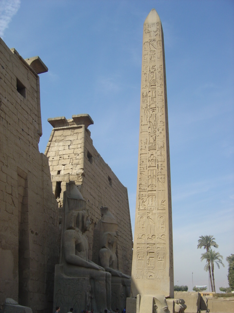 eigen foto Luxor januari 2007 Gebruiker:Ben Pirard